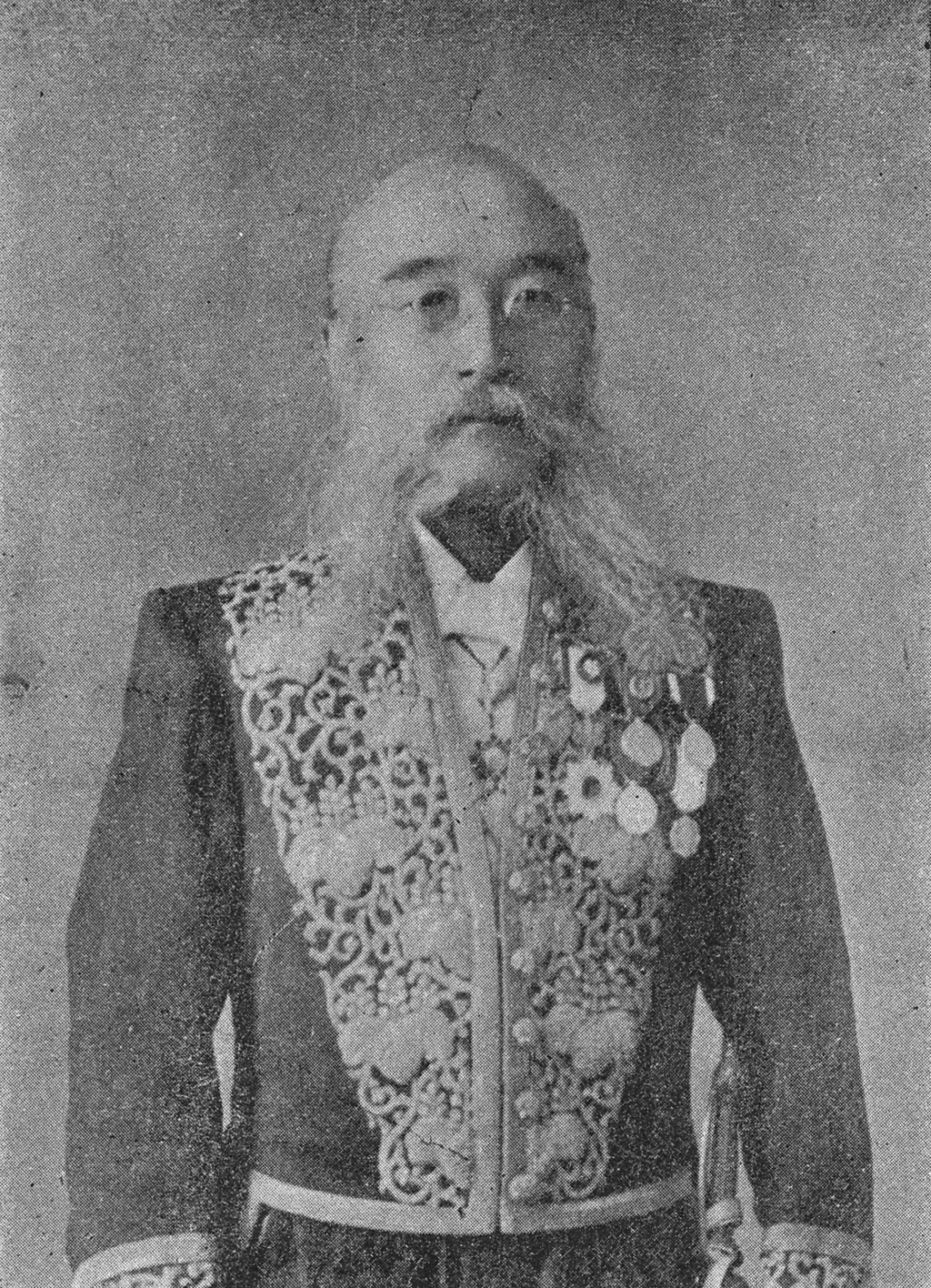 Portrait of Chisaka Takamasa (千坂高雅, 1841 – 1912)